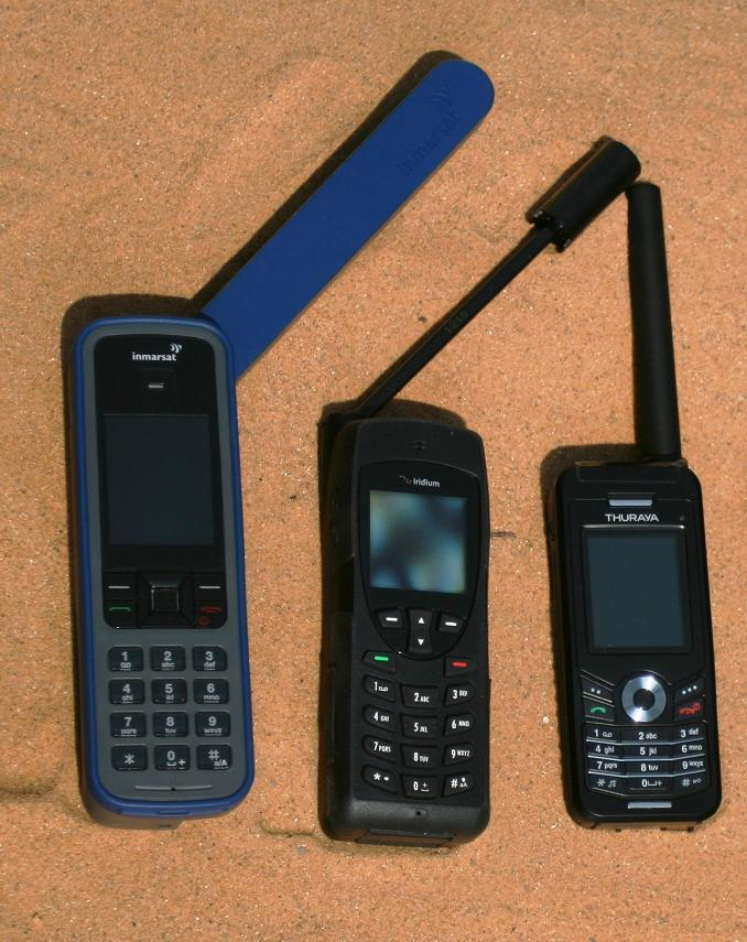 Zivil nutzbare Satellitentelefone im Größenvergleich. Von links nach rechts: Inmarsat "IsatPhone Pro", Iridium 9555, Thuraya XT